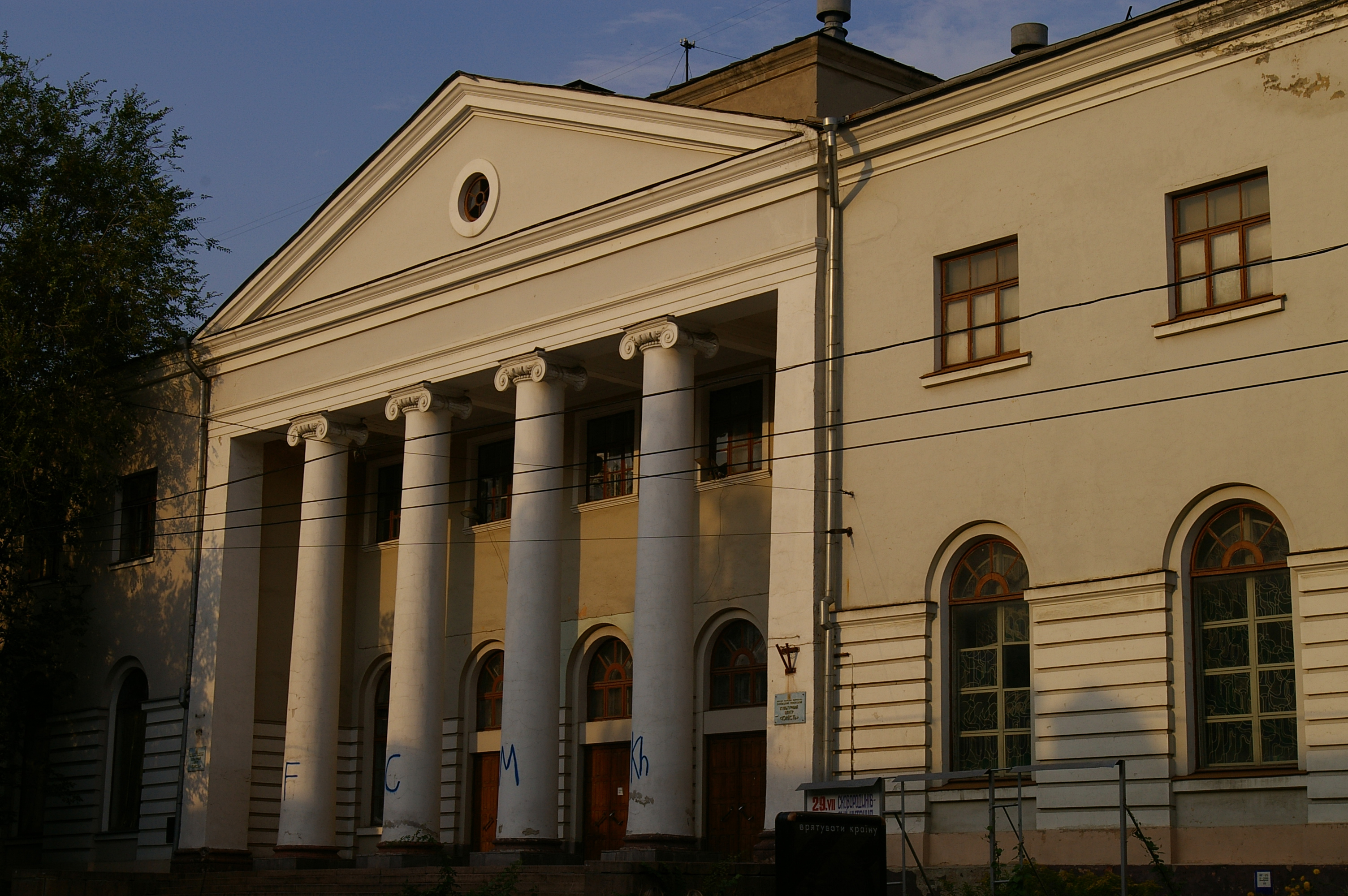 Харьков